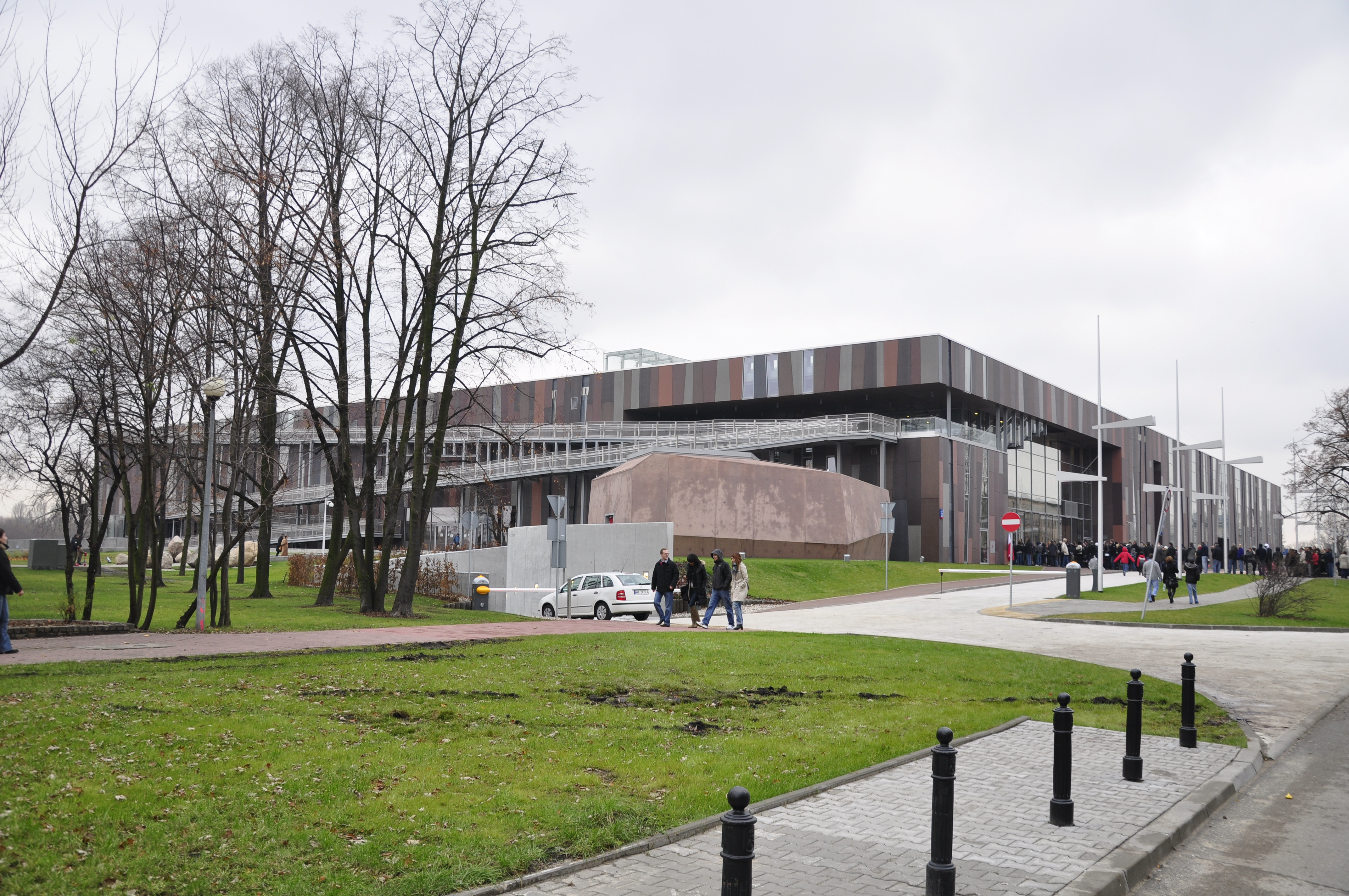 Kopernikus Zentrum Warschau